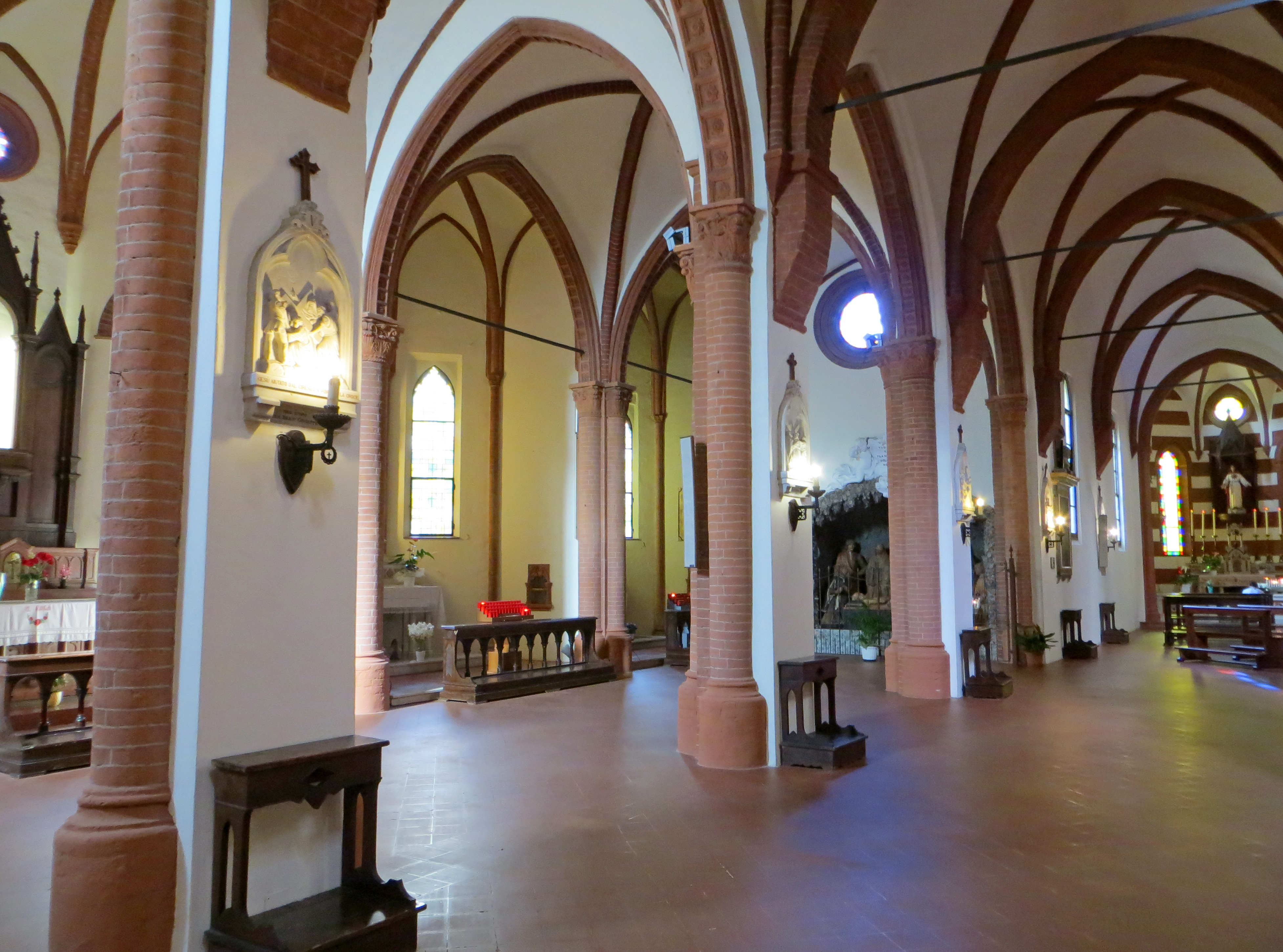 Chiesa di Santa Maria degli Angeli (Busseto) - navate sinistre